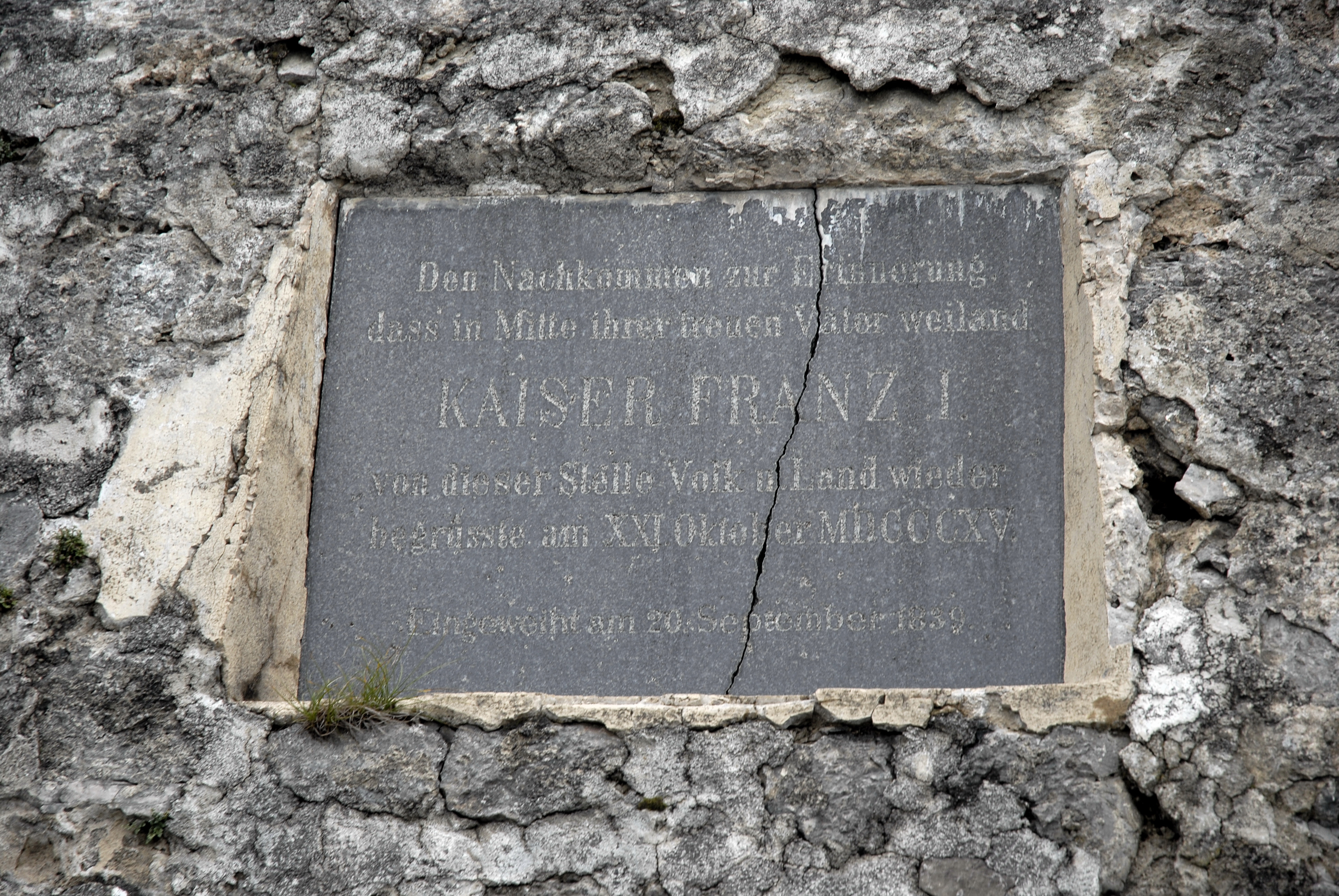 Gedenkstein auf der Kaisersäule bei Thaur